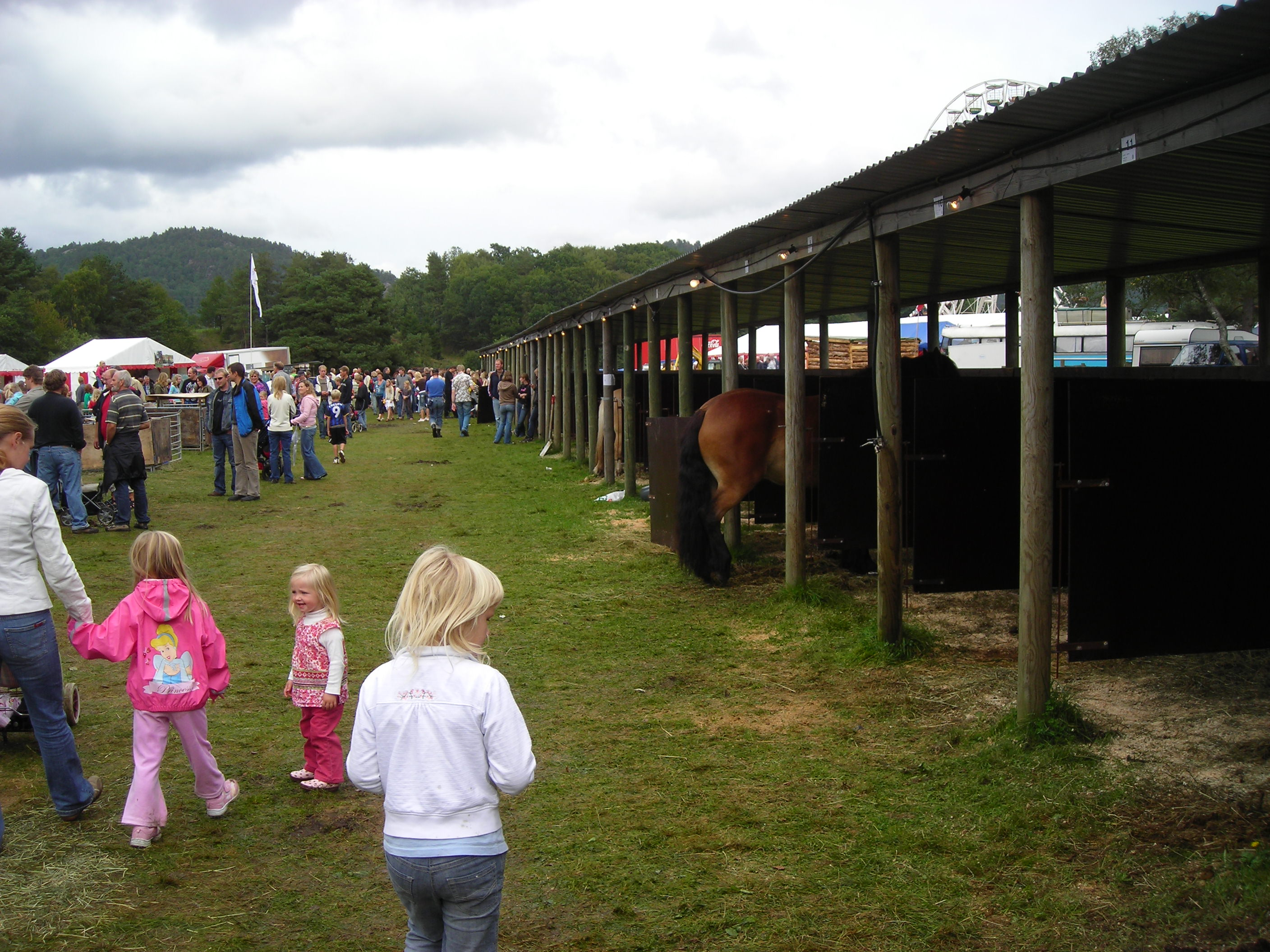 Fra Lyngdal Dyrskue september 2006